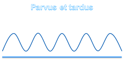 Forma de la onda parvus et tardus, caracterizada por una amplitud baja y una velocidad de ascenso lenta, pero una frecuencia normal y rítmica.